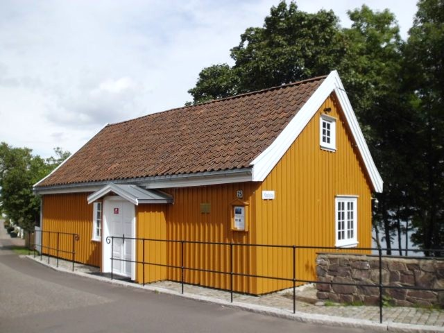 Munchhuset, Åsgårdstrand, Außenansicht